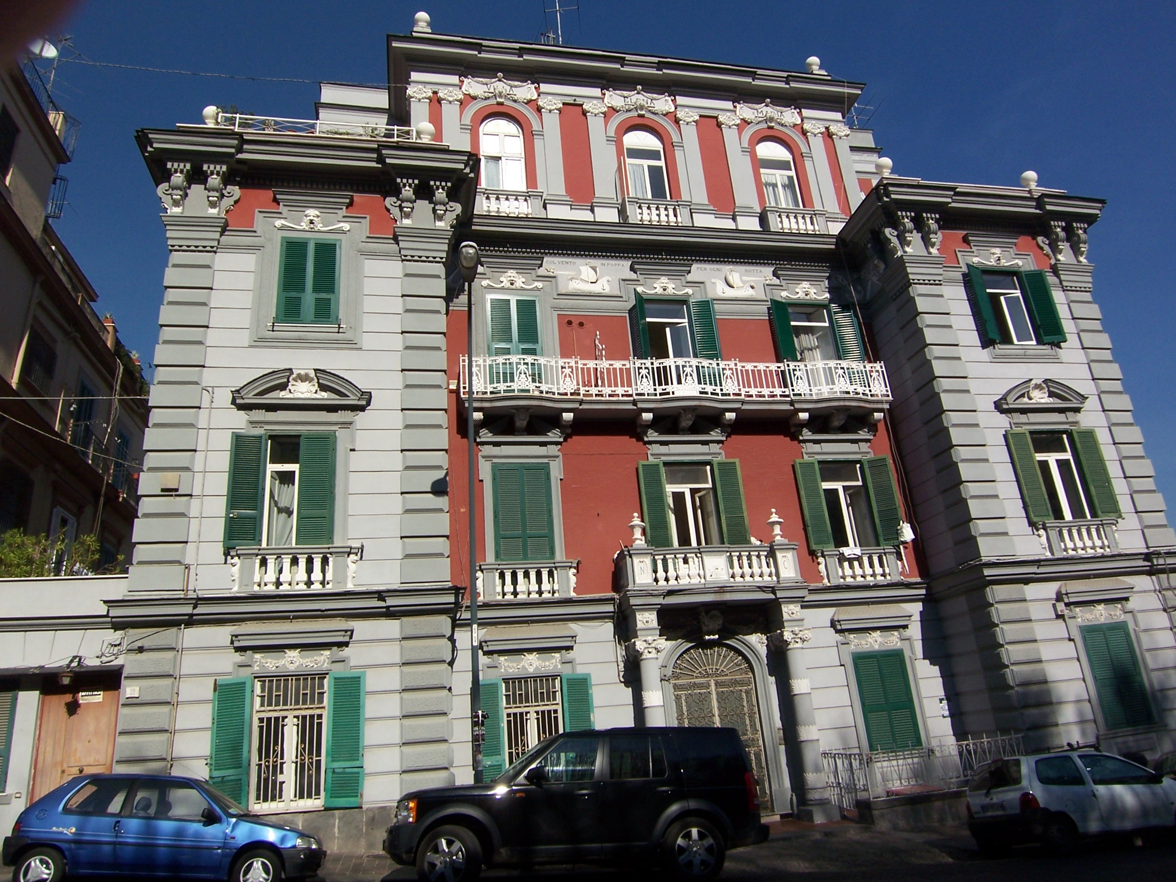 Villino Elena e Maria - Via Tito Angelini, 41 - San Martino (Michele Capo, Ettore Bernich)